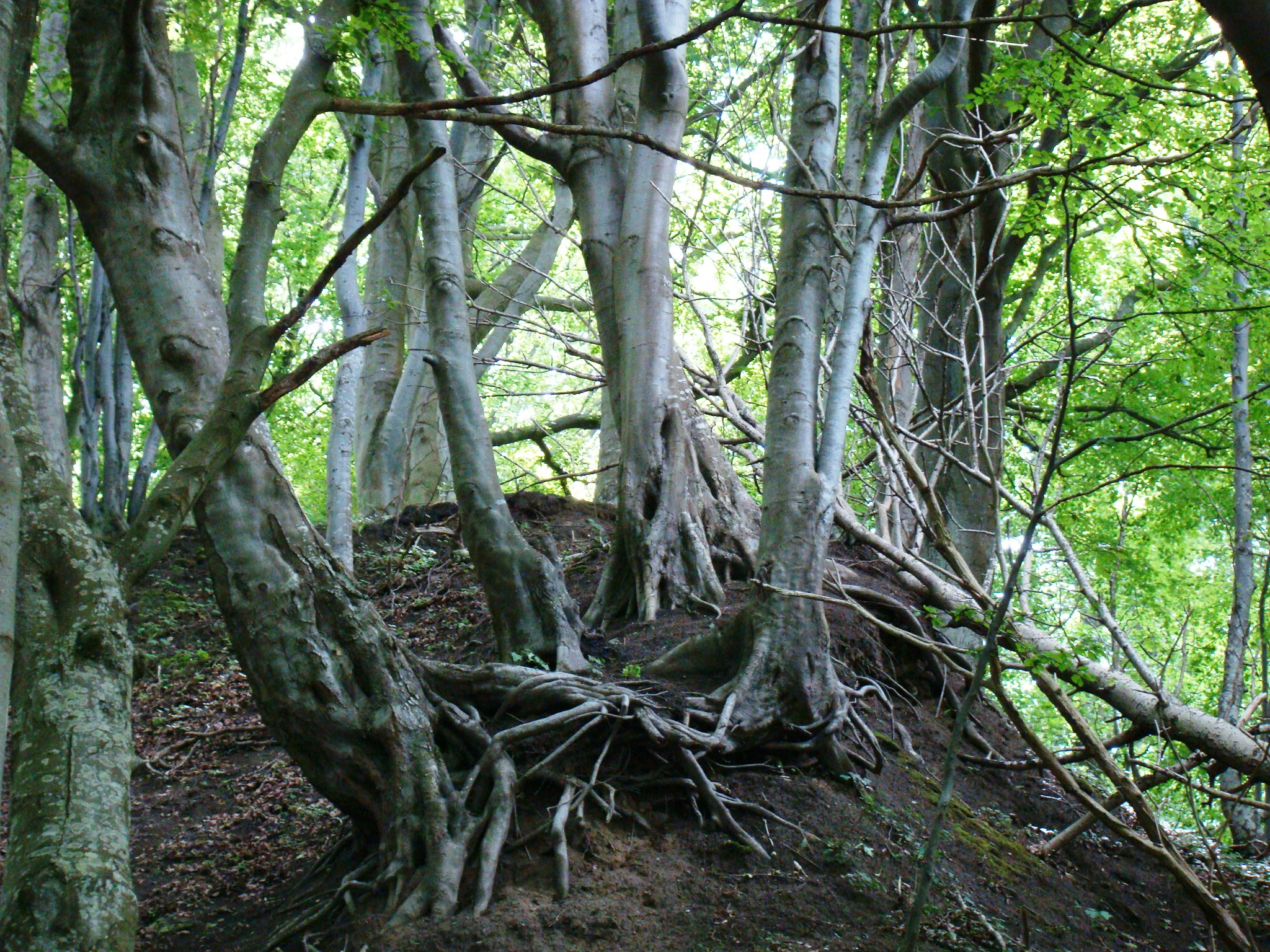 Las w Rozewiu